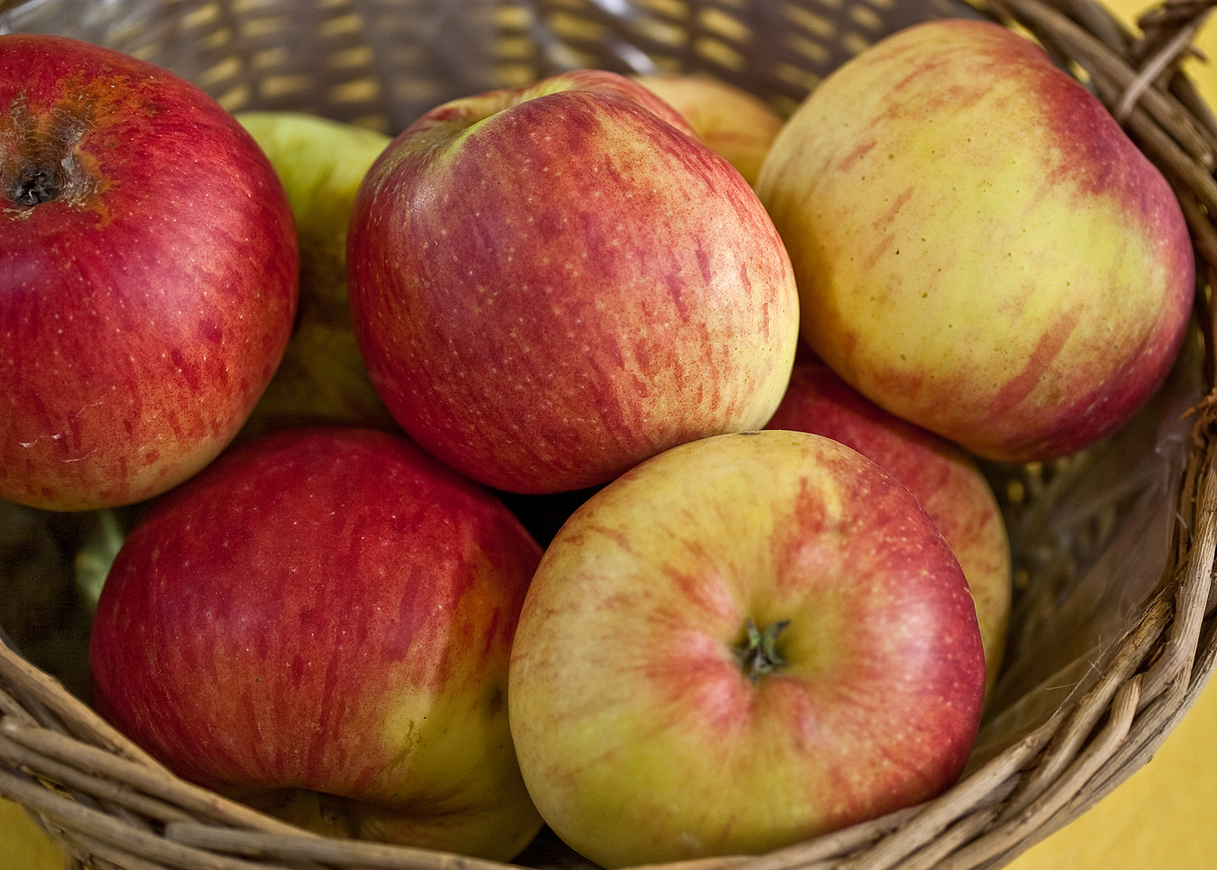 Der Reglindis ist eine Apfelsorte